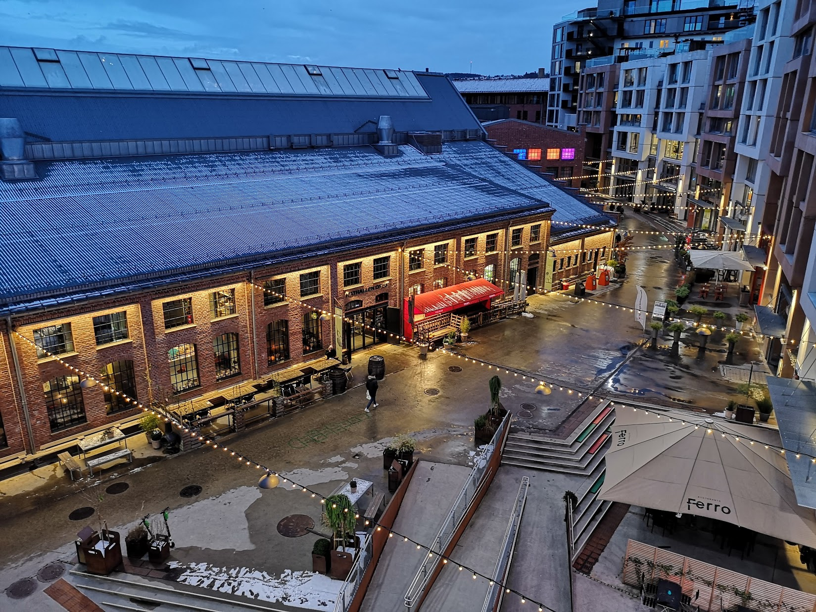 Gangvei gjennom Vulkan-kvartalet i Oslo